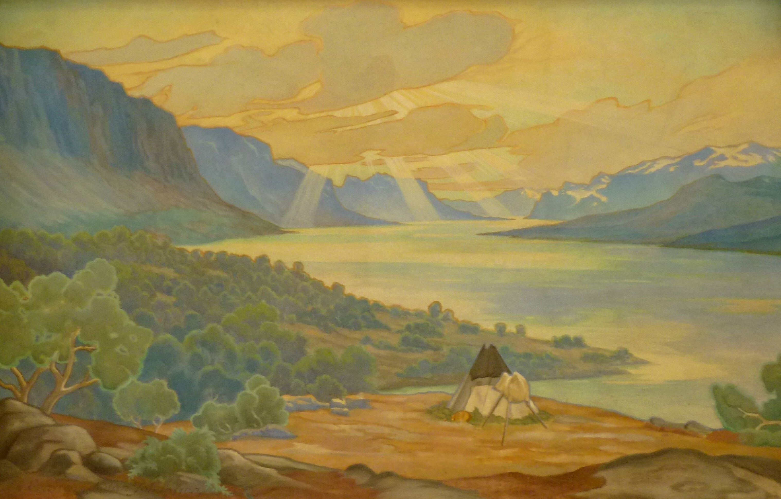 Väggmålning i Stockholm Centralens vänthall: Saltoluokta mot Stora Sjöfallet